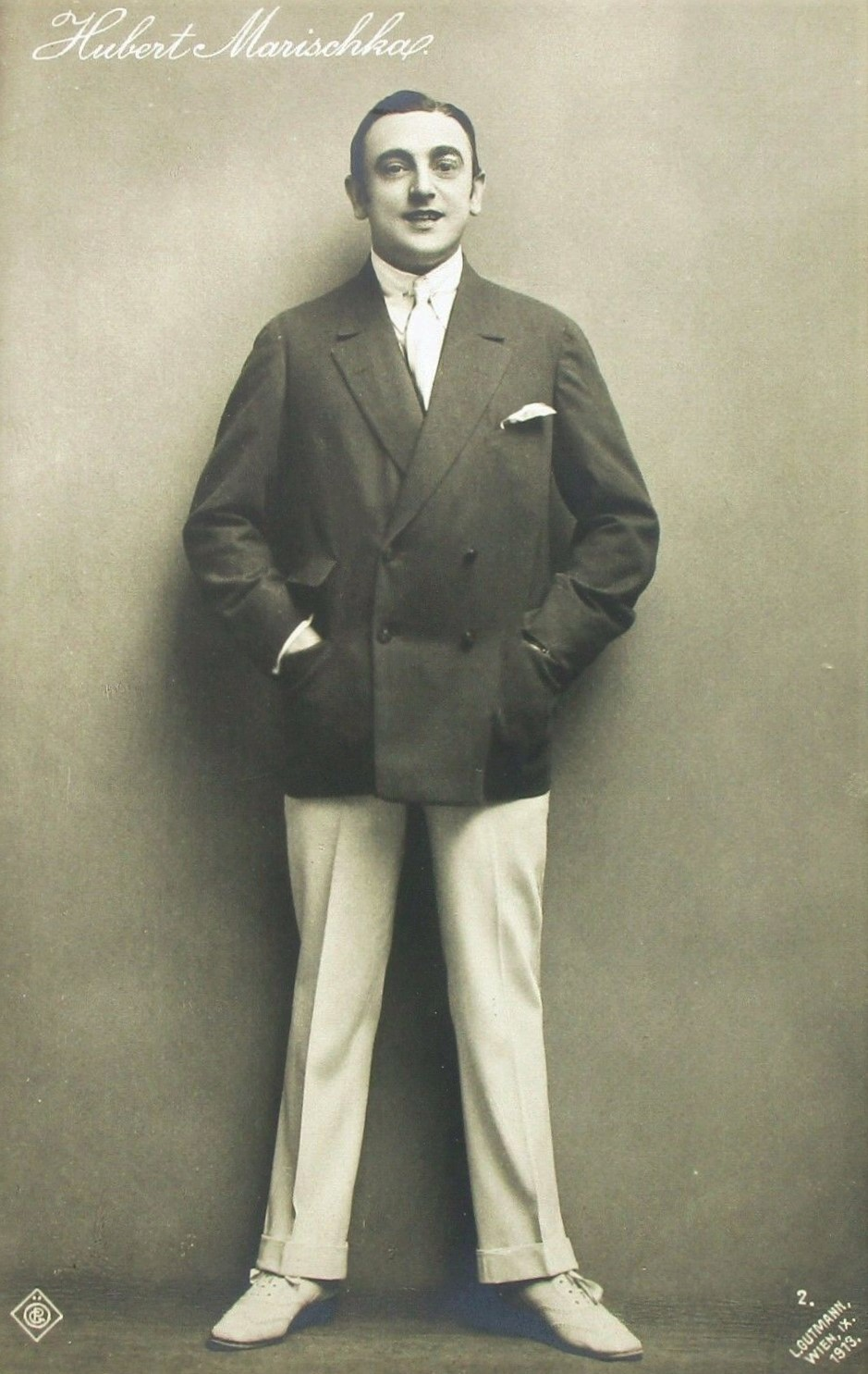 Hubert Marischka, fotografiert von Ludwig Gutmann, Wien